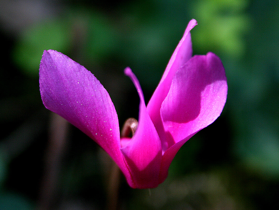 Cyclamen repandum (Cyclamen repandum) - Habitat: Gorges du Prunelli ( Corse-du-Sud) - France.